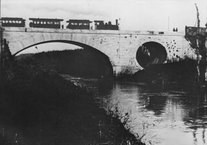 tram Roma-Tivoli